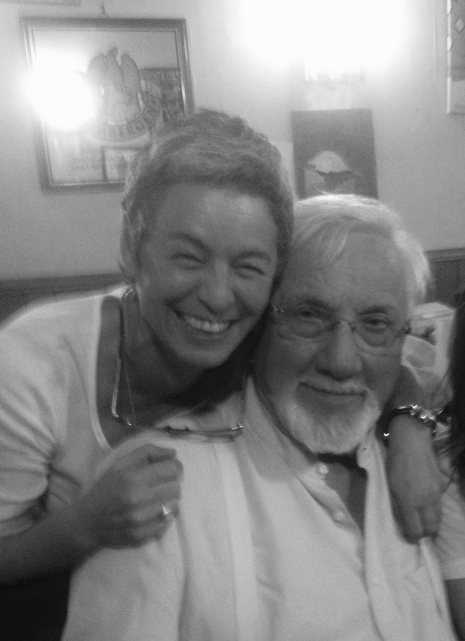 complicité entre artistes